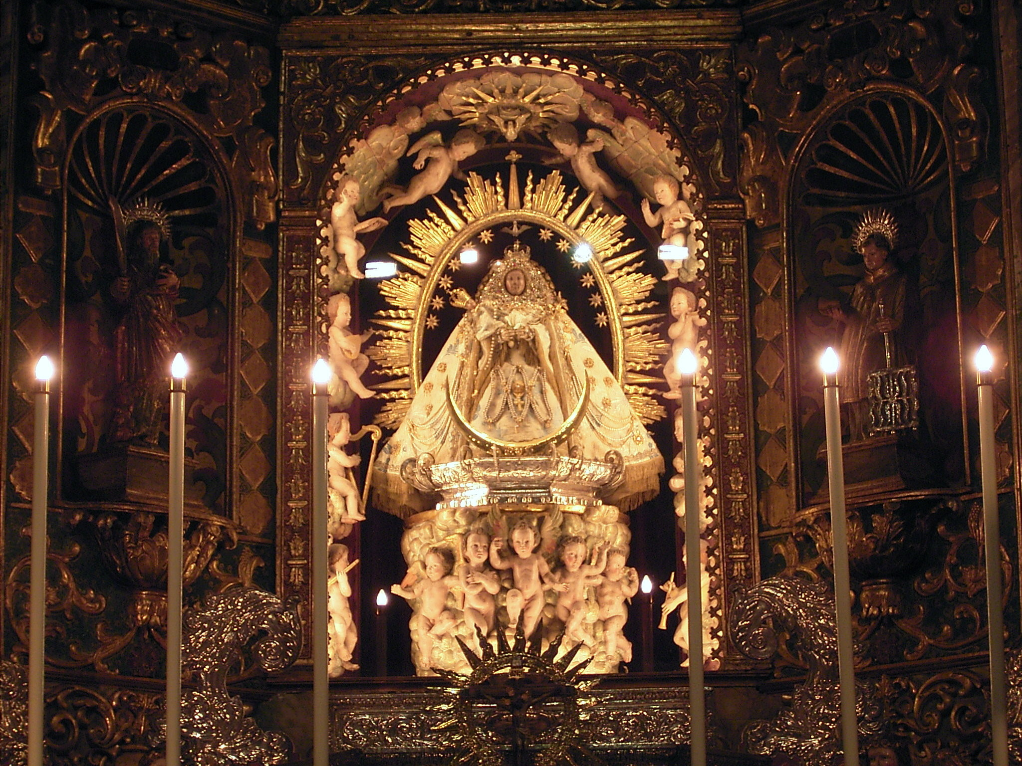 Virgen de las Nieves in Santa Cruz, La Palma, Canary Islands